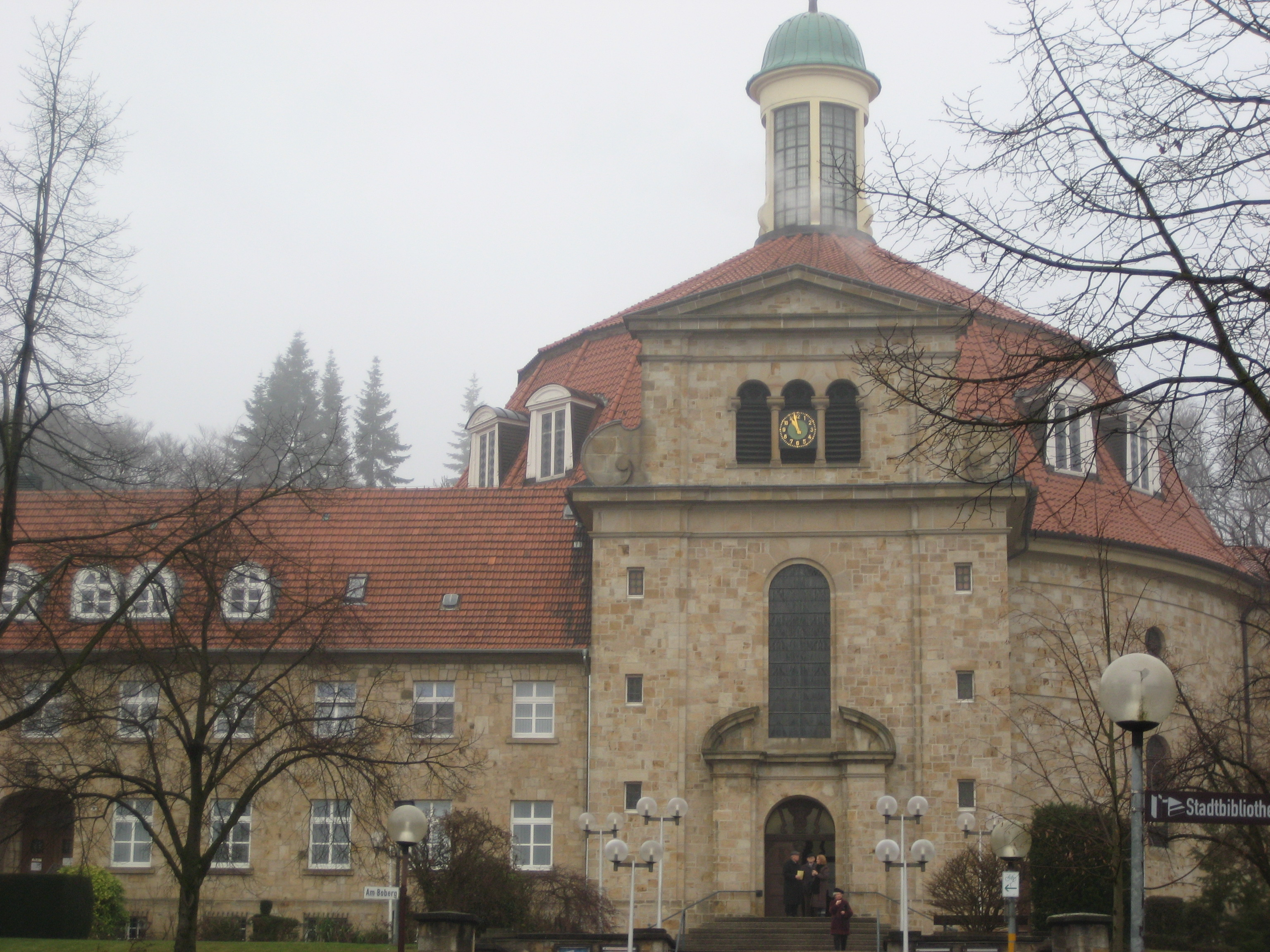 Kloster Ohrbeck mit Klosterkirche in Georgsmarienhütte, 1926 gebaut